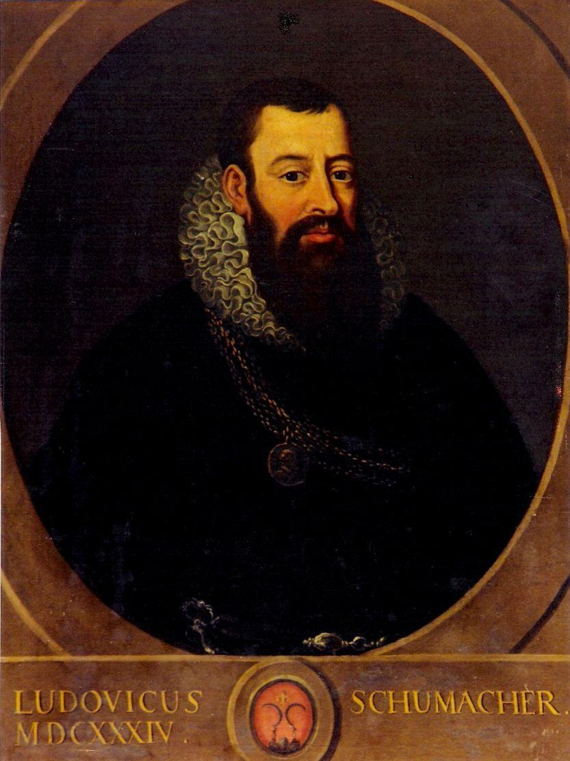 Porträt von Schultheiss Ludwig Schumacher mit Halskrause und Ritterkette, Rathaus Luzern (Schultheissensaal)